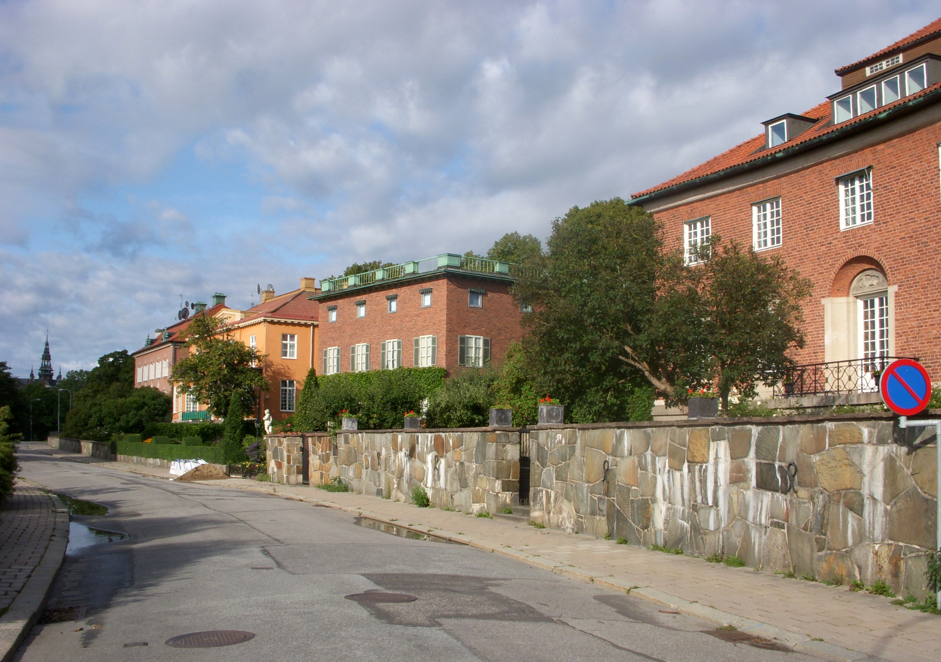 Nobelgatan i Stockholm i Diplomatstaden, Östermalm. I bakgrunden syns Nordiska museets torn.